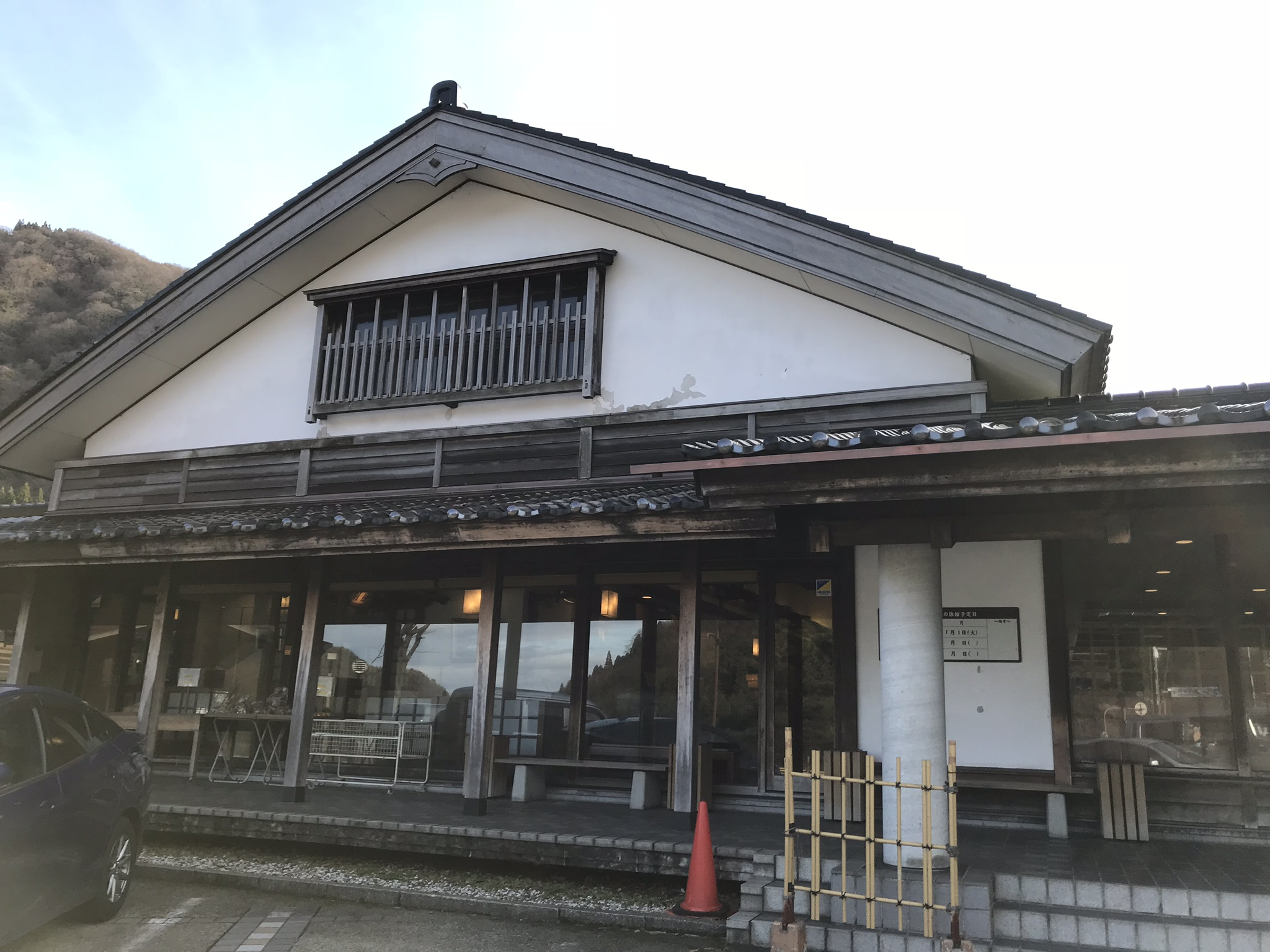 神通峡岩稲温泉